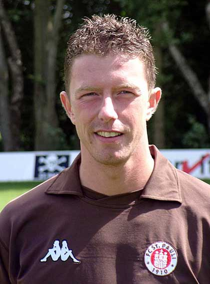 Beschreibung: Nico Patschinski (Spieler des FC St.Pauli, Saison 2002/03) Quelle: Fotografiert am 28.Juni 2002 im Rahmen der offiziellen Presseeinladung zum Manschaftsfotoschiessen des FC St.Pauli Fotograf oder Zeichner: Stefan Roßkopf Lizenzstatus: GNU FDL